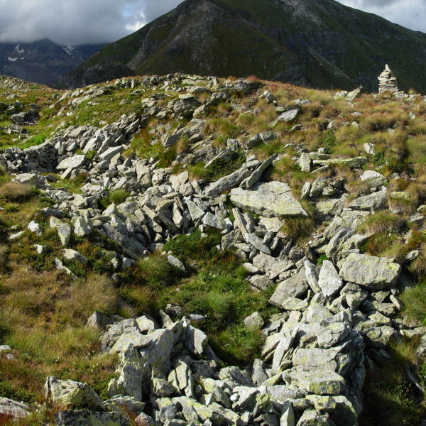 Capanna dei Salassi al Col Pierrey (2620 m), raggiungibile dalla frazione di Etirol, comune di Torgnon , Valle d'Aosta, Italia.